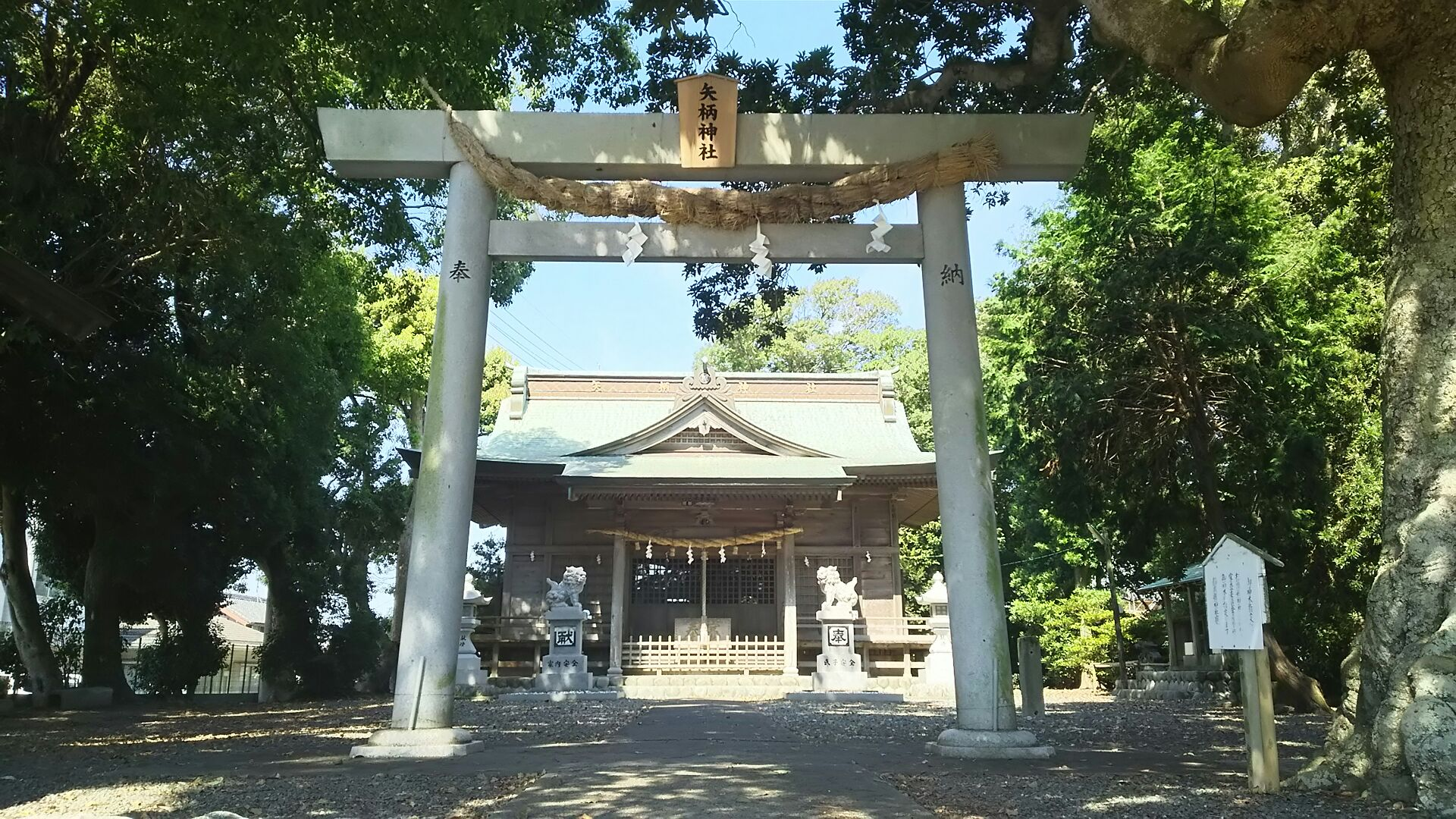 矢柄神社の鳥居と拝殿